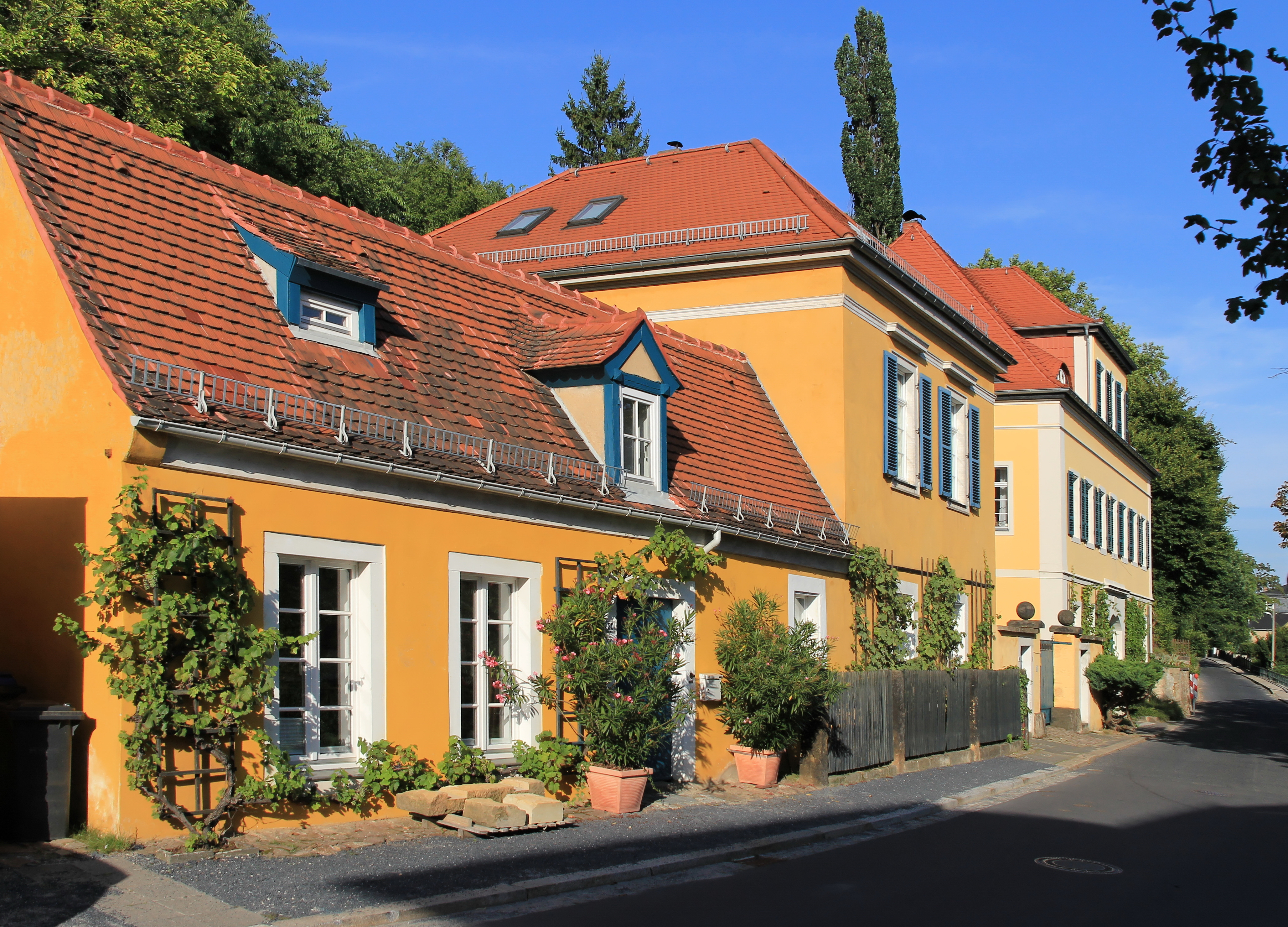 Minckwitzsches Weingut, Obere Bergstraße, Radebeul